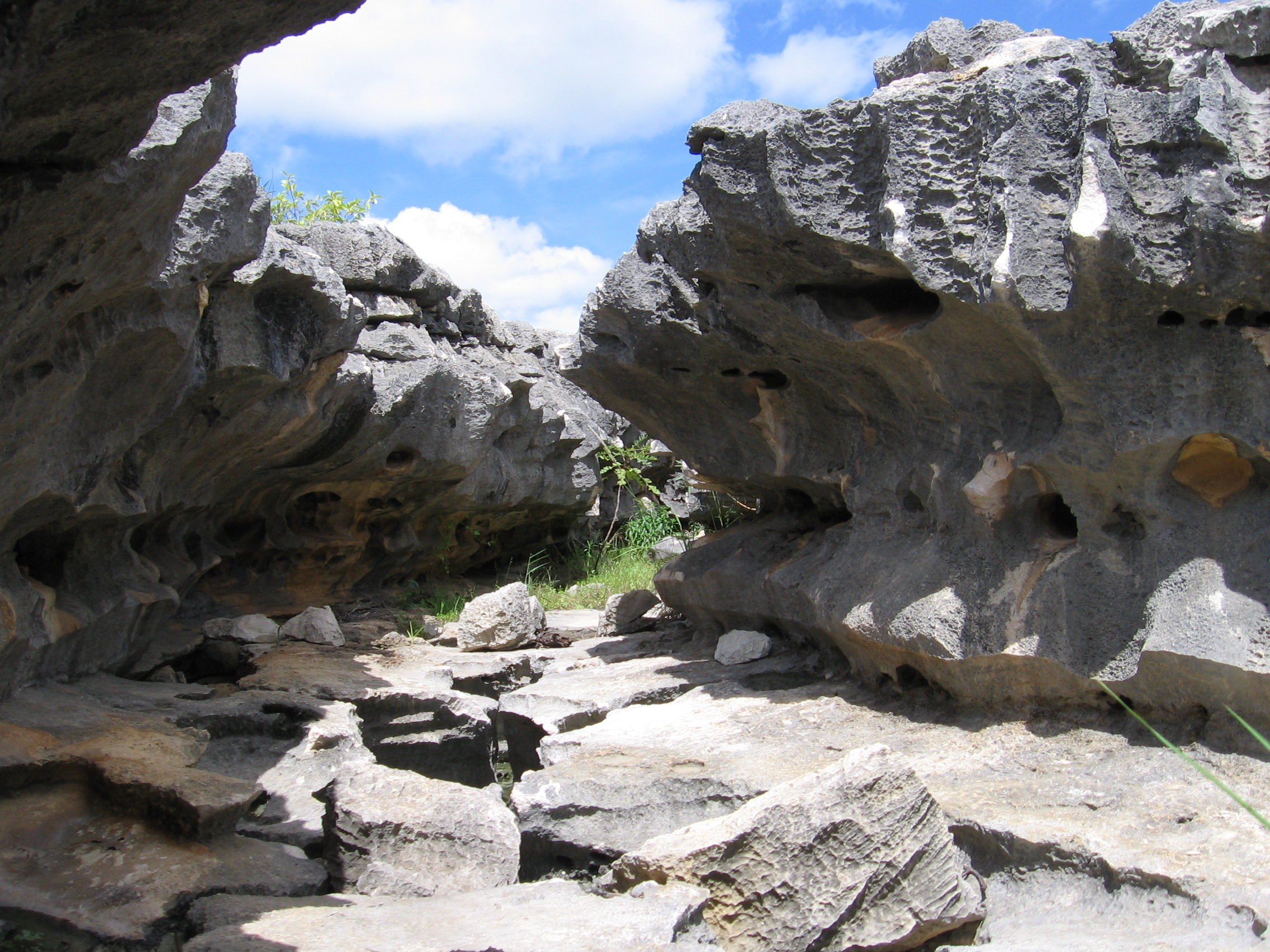 Sitio Arqueológico do Lajedo de Soledade em Apodi, no Rio Grande do Norte (Brasil).